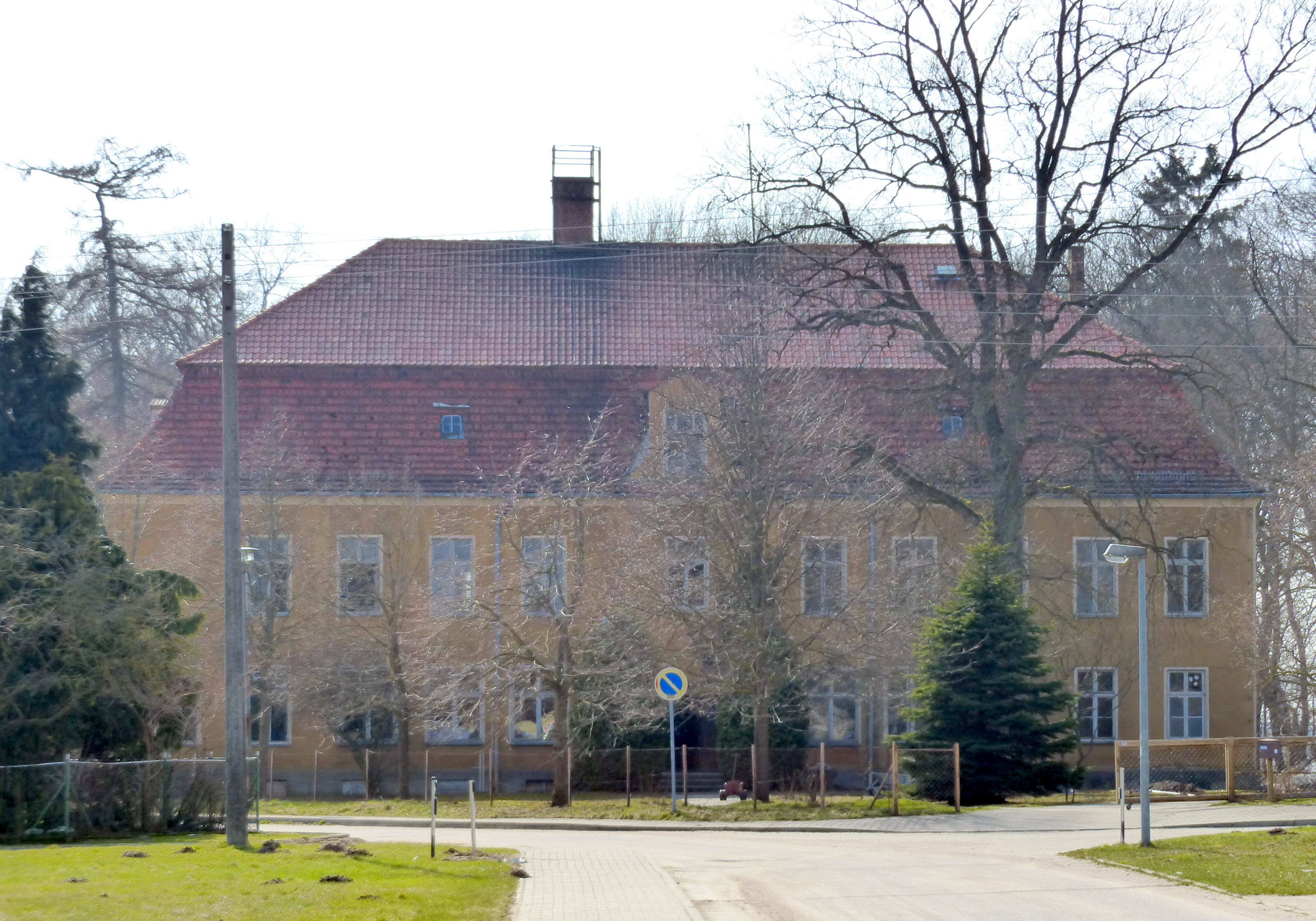 Gutshaus Rubkow, Zufahrt von Osten